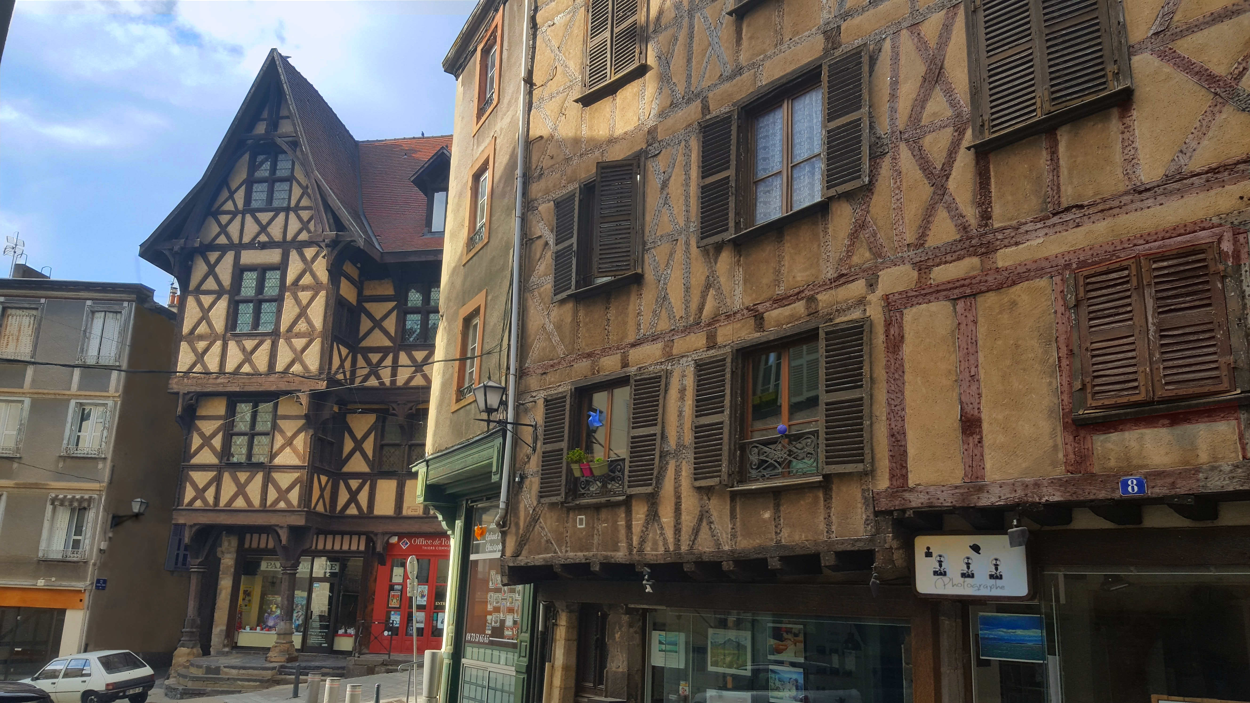 Thiers 63